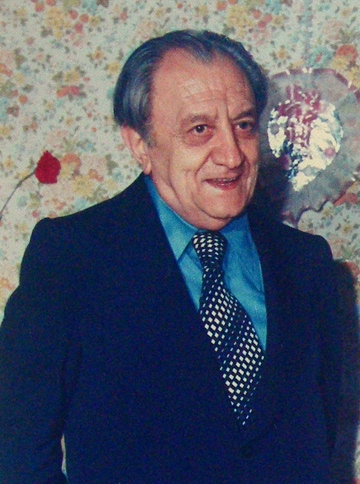 جعفر بدیعی بنیانگذار کیهان بچه ها